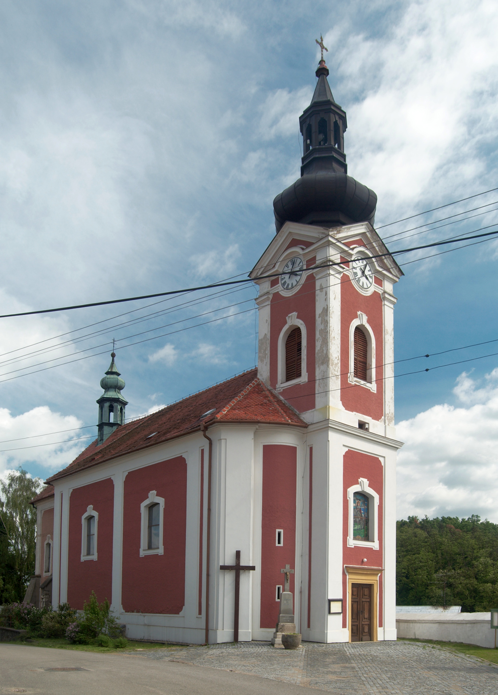 Ořechov - kostel sv. Jiří v bývalé obci Tikovice